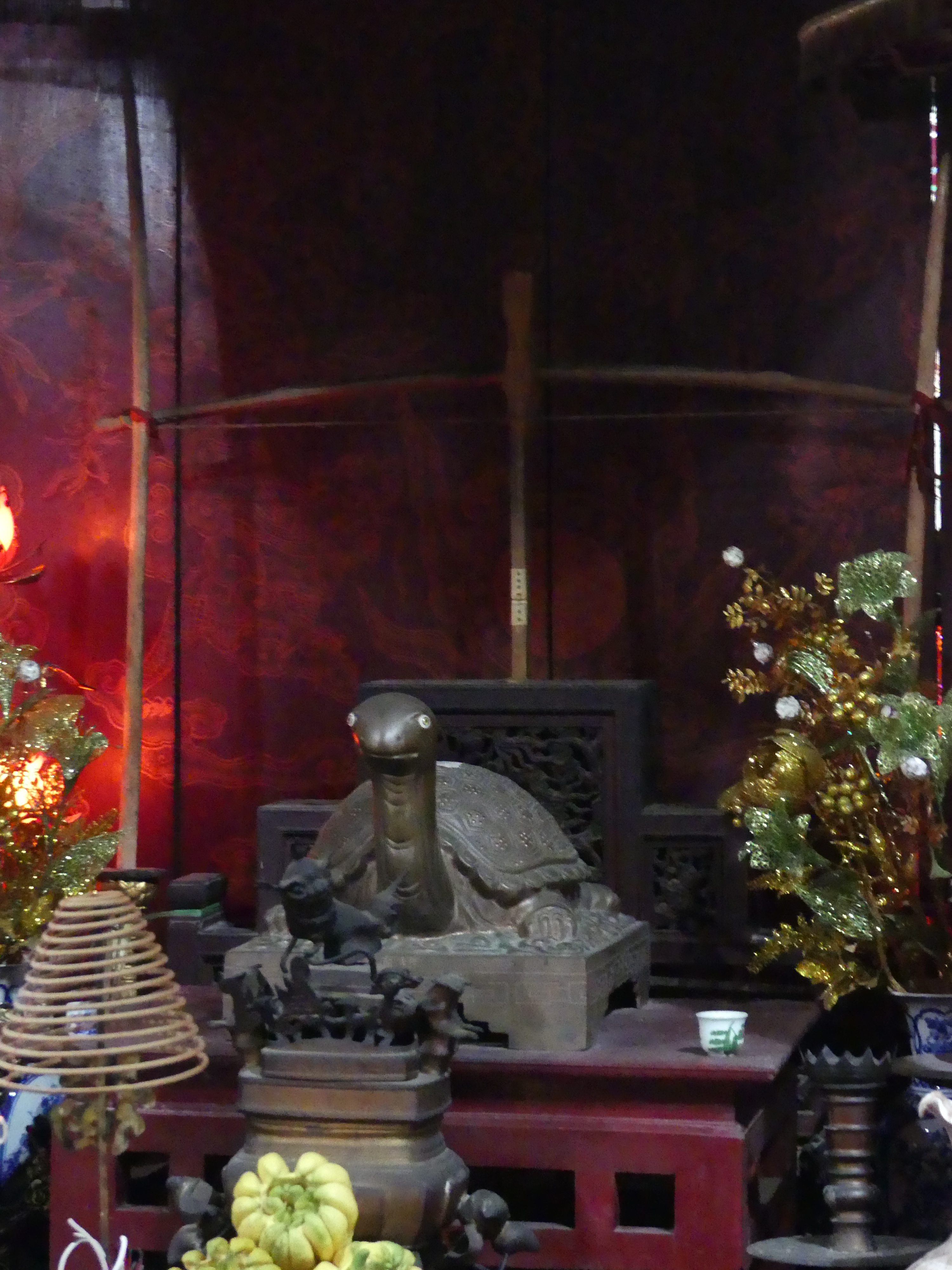 The Golden Turtle and the Magic Crossbow at the An Duong Vuong Temple in Co Loa, Dong Anh District, Hanoi, Vietnam